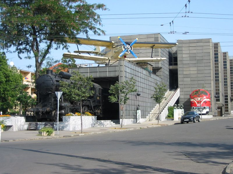 hungary budapest transport museum